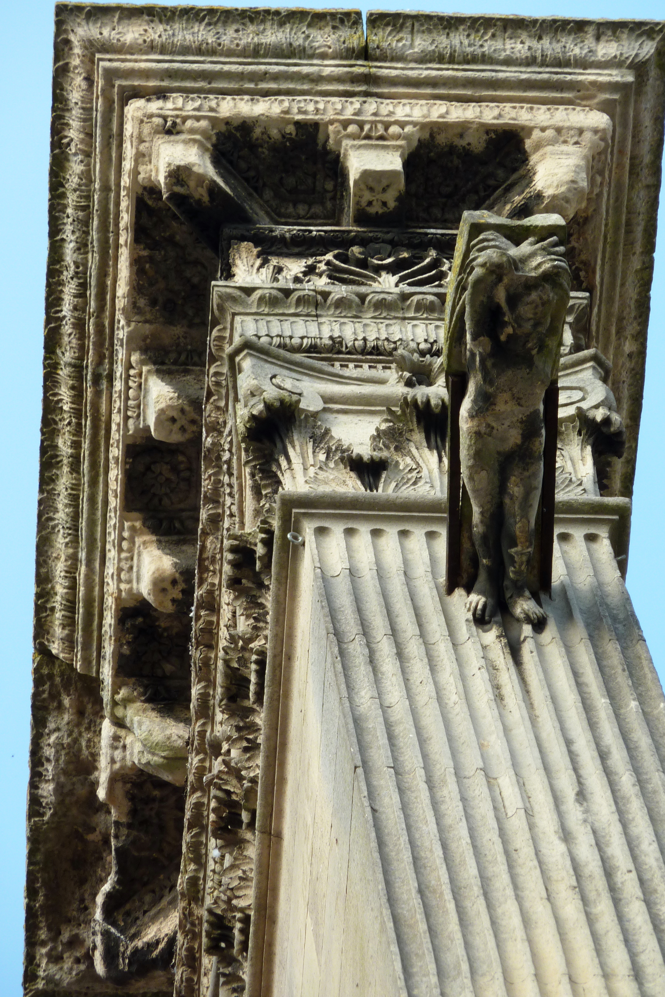 Kirche Saint-Didier in Villiers-le-Bel